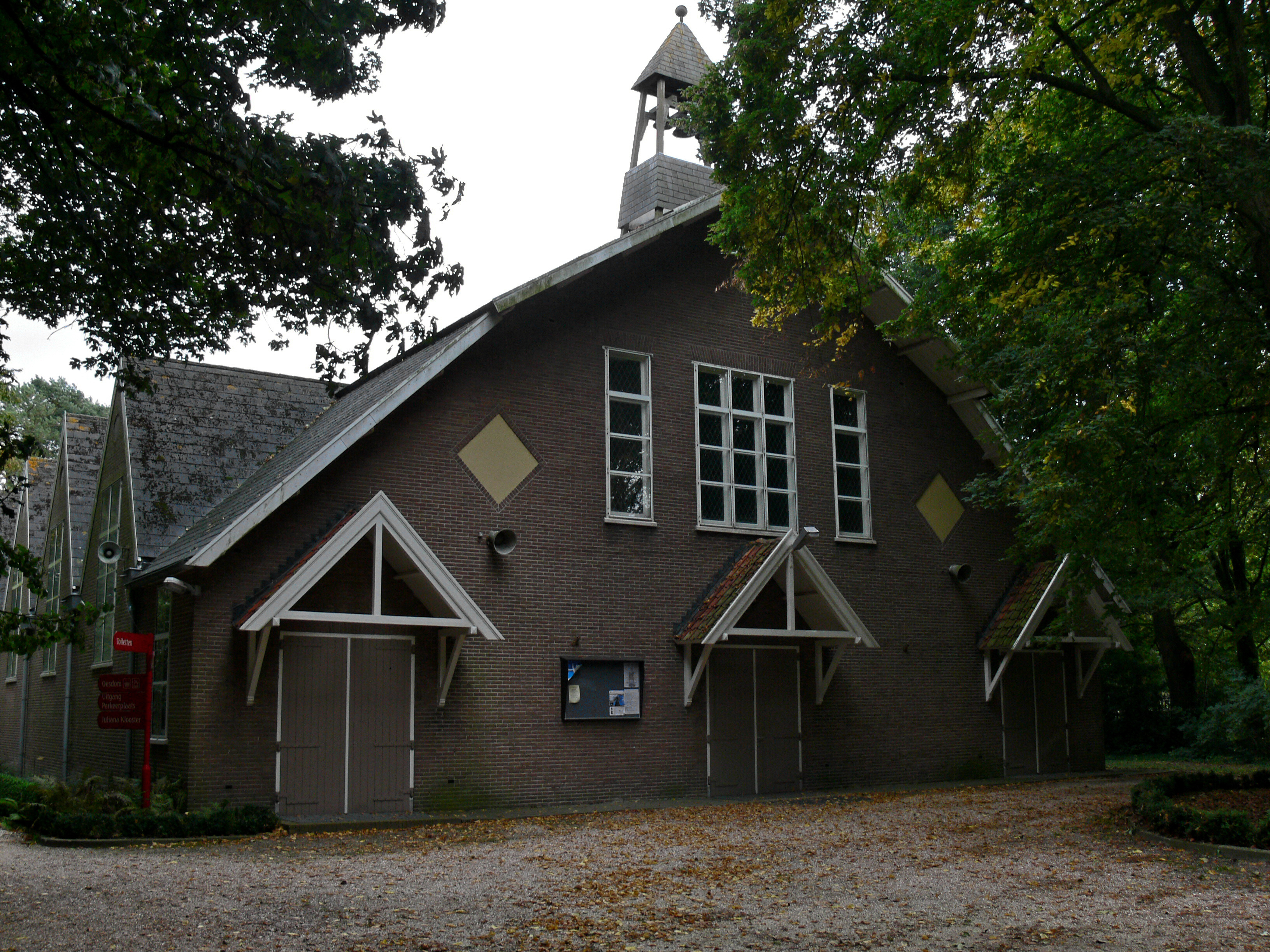 De BEDEVAARTSKERK is in 1913 gebouwd als noodkerk naar ontwerp van Jan Stuyt als onderdeel van het bedevaartscomplex 'Onze Lieve Vrouwe ter Nood'. Het plan was om de noodkerk na vijftig jaar te vervangen door een basiliek, maar zover is het nooit gekomen. Eind jaren vijftig is het priesterkoor verhoogd en uitgebreid met een halfronde absis. De rode Hollandse pannen op het kerkdak zijn in 1988 vervangen door leien in maasdekking. Tegelijkertijd zijn bovenin het dak van buitenaf niet zichtbare legramen aangebracht en kregen de vensters voorzetramen. Het als dakruiter uitgevoerde klokkentorentje boven de voorgevel is meermalen vernieuwd. Het huidige exemplaar dateert uit 1996, evenals de drie door Petit en Fritsen in Aarle-Rixtel gegoten klokken. De oorspronkelijke banken zijn in de jaren vijftig vervangen door de huidige banken met handhaving van het oude bankenplan. Opvallend is de ziende kapconstructie die nog voorzien is van de originele polychromie.